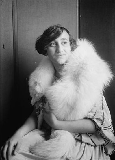 Erika Morini (1906- 1995), Austrian violinist